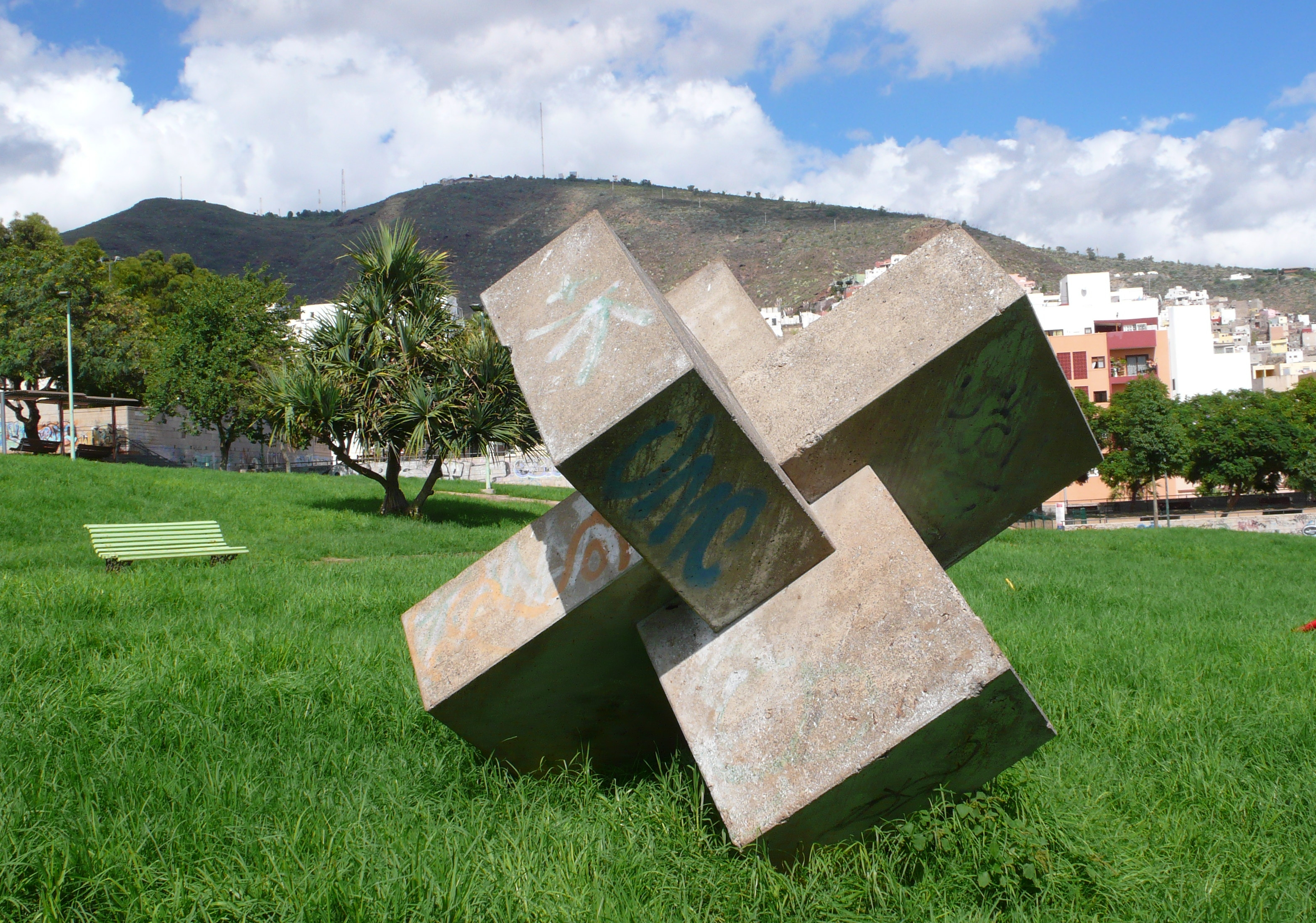 Escultura Macla de Eduardo Gregorio, actualmente en el Parque de Las Indias, Santa Cruz de Tenerife.